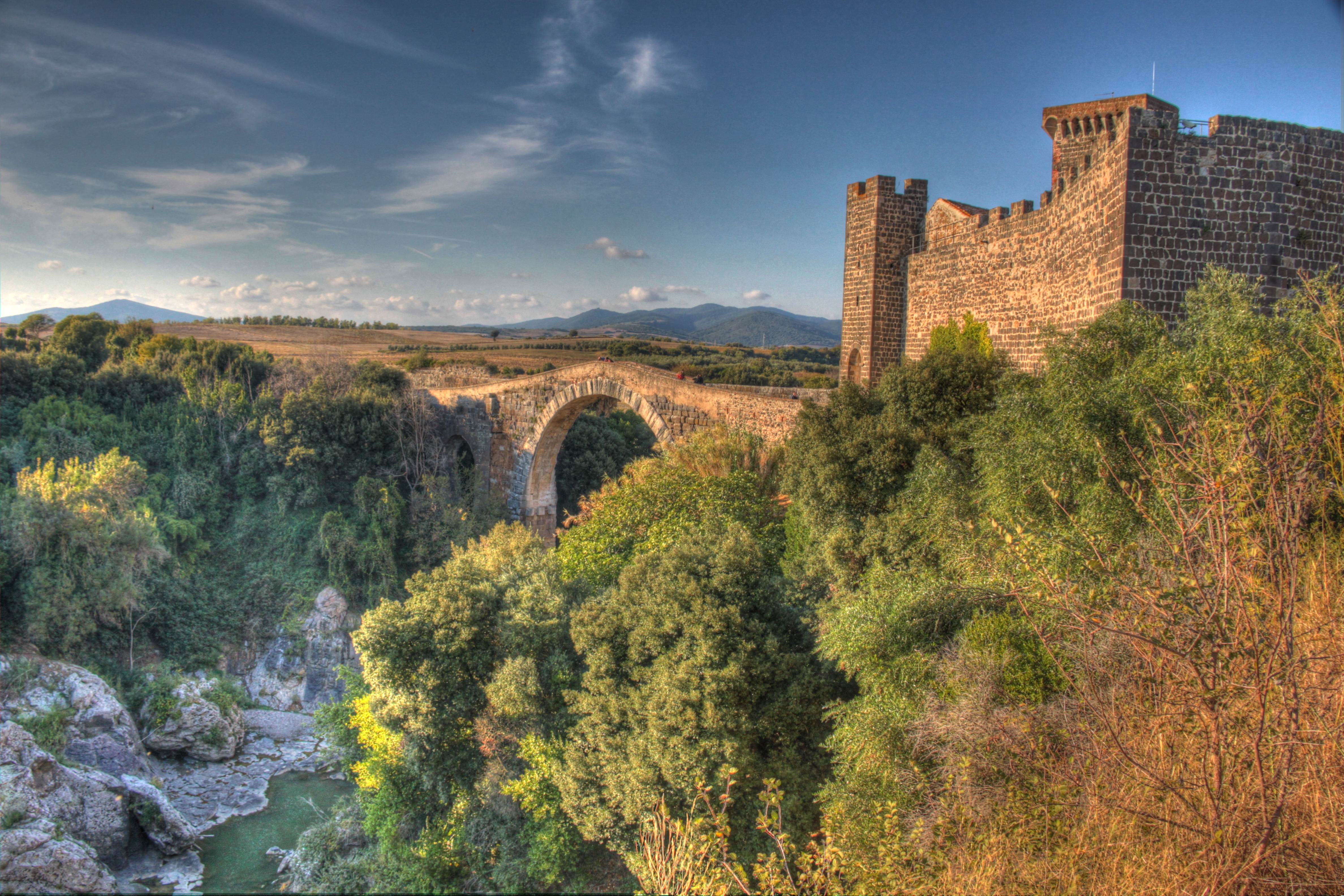 Vulci, il Castello della Badia, con il ponte romano sul fiume Fiora. Ospita il Museo archeologico nazionale etrusco con i reperti rinvenuti nella vicina città etrusco romana di Velzna